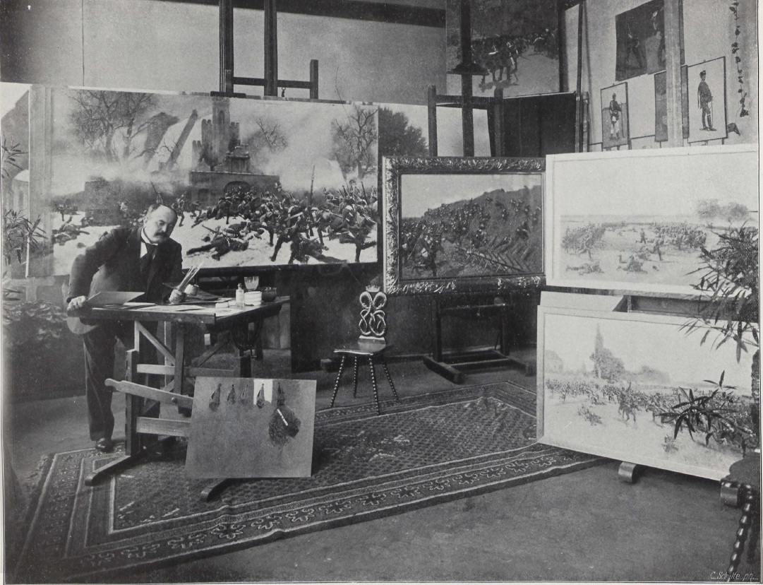 Der deutsche Maler Carl Röchling (1855-1920)in seinem Berliner Atelier, aufgenommen 1900.